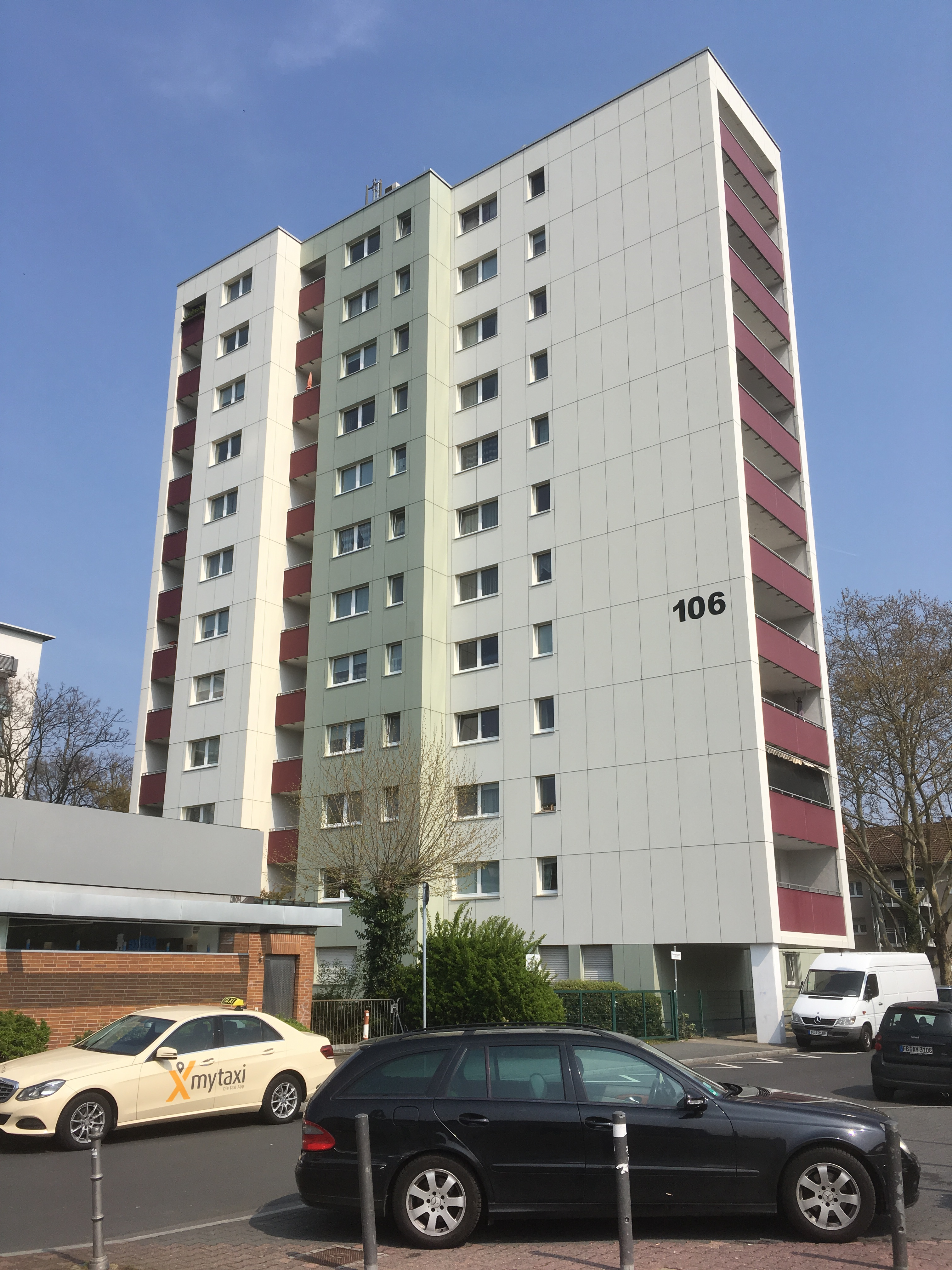 Wohnhochhaus Schwarzerlenweg 106 im Südwesten der Siedlung nahe der S-Bahn-Station Frankfurt-Griesheim und dem Bürgerhaus Griesheim